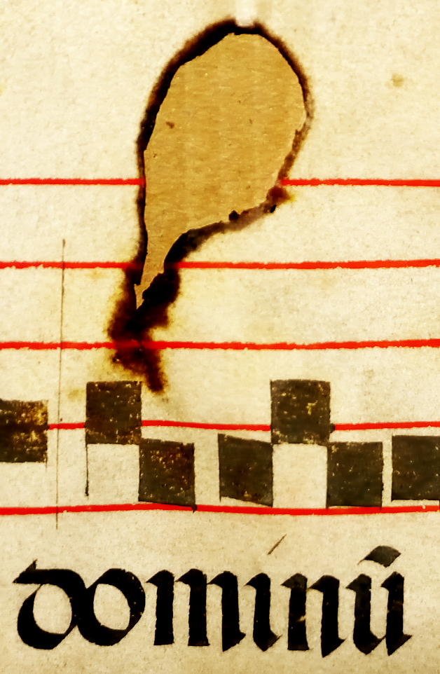 Eine Lacuna mit verkohltem Rand in einer Neumenhandschrift in Quadratnotation auf Pergament über dem Text "Dominus"